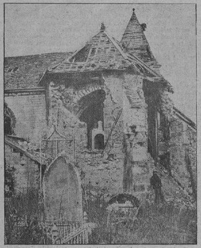 l'église de Prosnes et les destructions qu'elle subit pendant la Première Guerre moandiale.